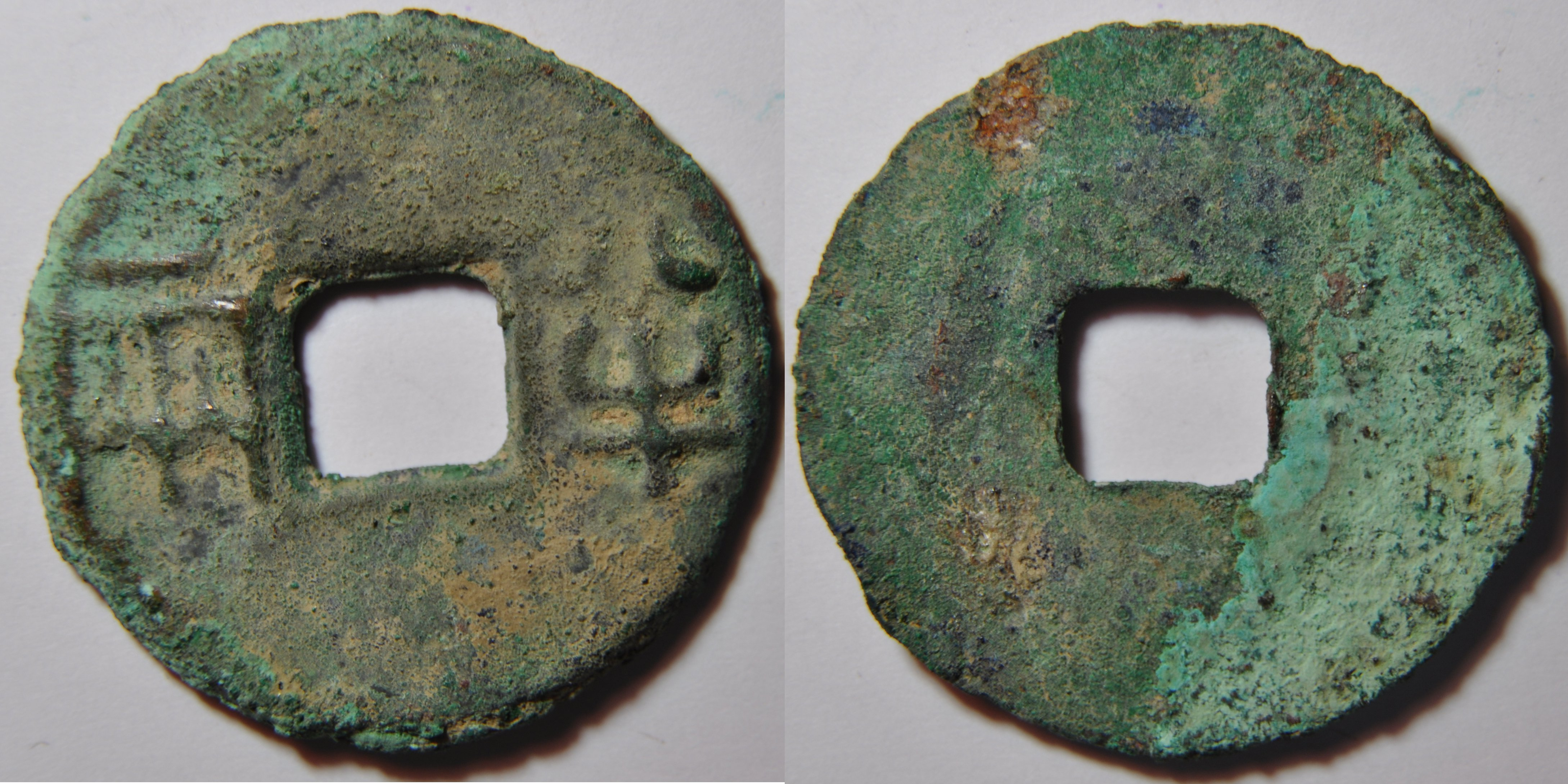 A/ Banliang R/ vide Une sapèque du royaume de Qin de la période 344-336 BC. Dimension : 33.62 mm Poids : 8.8 g. Référence : H7.7 Chine monnaie Royaume Qin Monnaies du Royaume Qin de la période des Royaumes combattants